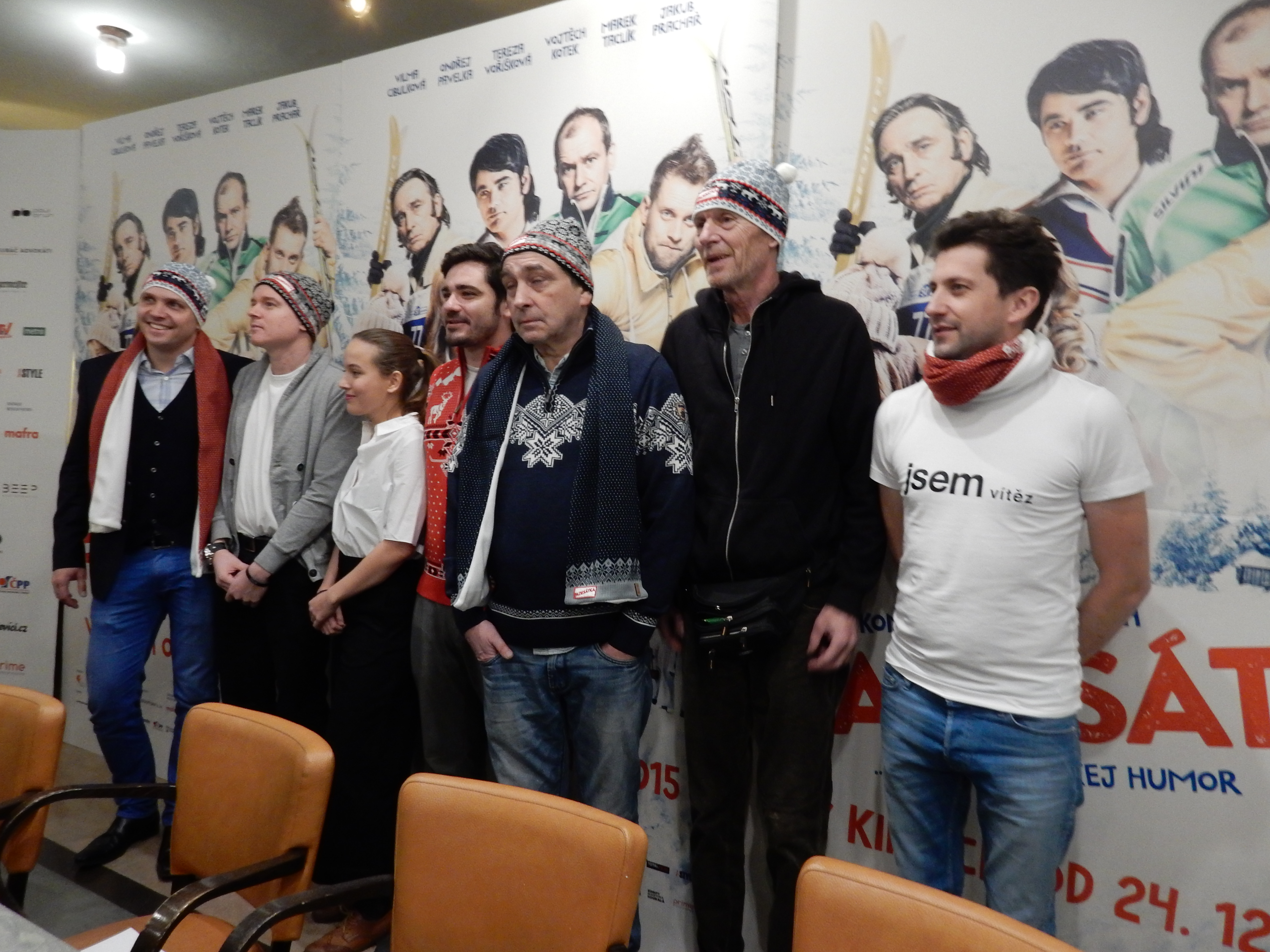 Fotky z novinářské konference 17.12.2015. Autor: Blanka Borová (Karolína Černá) pro Kritiky.cz & 10Mpix.cz